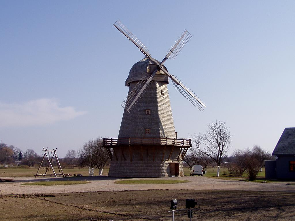 Rības vējdzirnavas pie Ceraukstes 2007-03-24